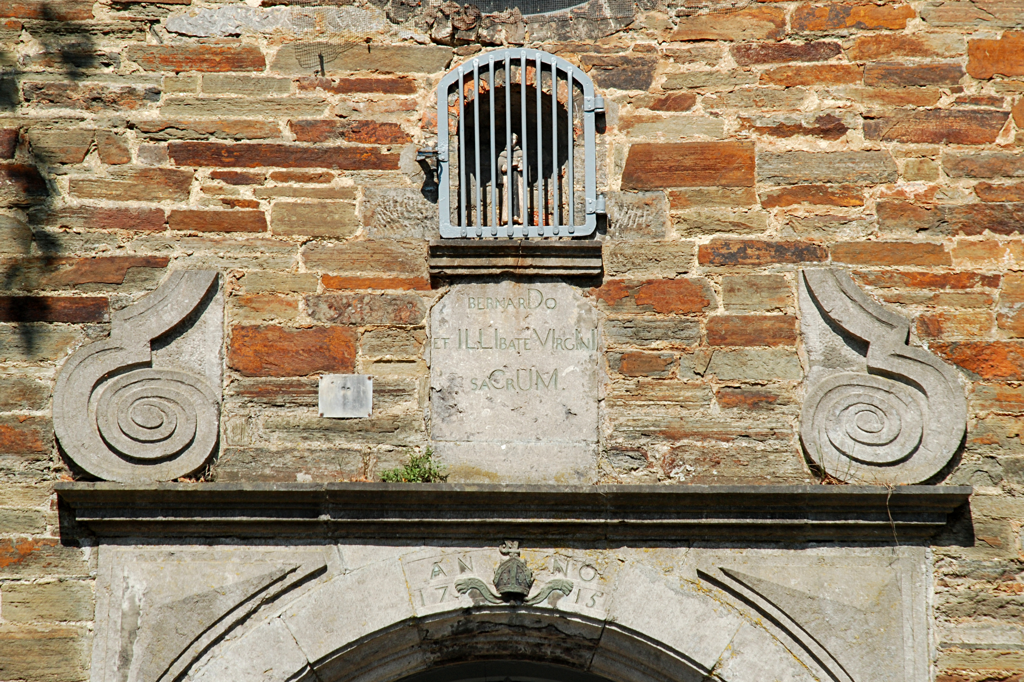 Belgique - Brabant wallon - Villers-la-Ville - Chapelle Saint-Bernard